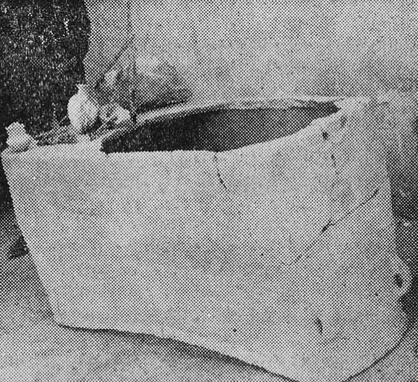 یک تابوت سفالین بسیار قدیمی به درازای ۱ متر و ۴۵ سانتیمتر و بلندای ۷۰ سانتیمتر و پهنای ۵۰ تا ۶۵ سانتیمتر به وزن ۵۰۰ کیلو یه همراه دو گلدان بزرگ و کوچک و سرنیزه، تبر، آهن لوله، آهن پهن کوچک با نشانی شبیه صلیب و یک کارد پیدا شد که در سال فروردین سال ۱۳۴۵ به اداره آموزش و پرورش بوکان واسپرده شد.